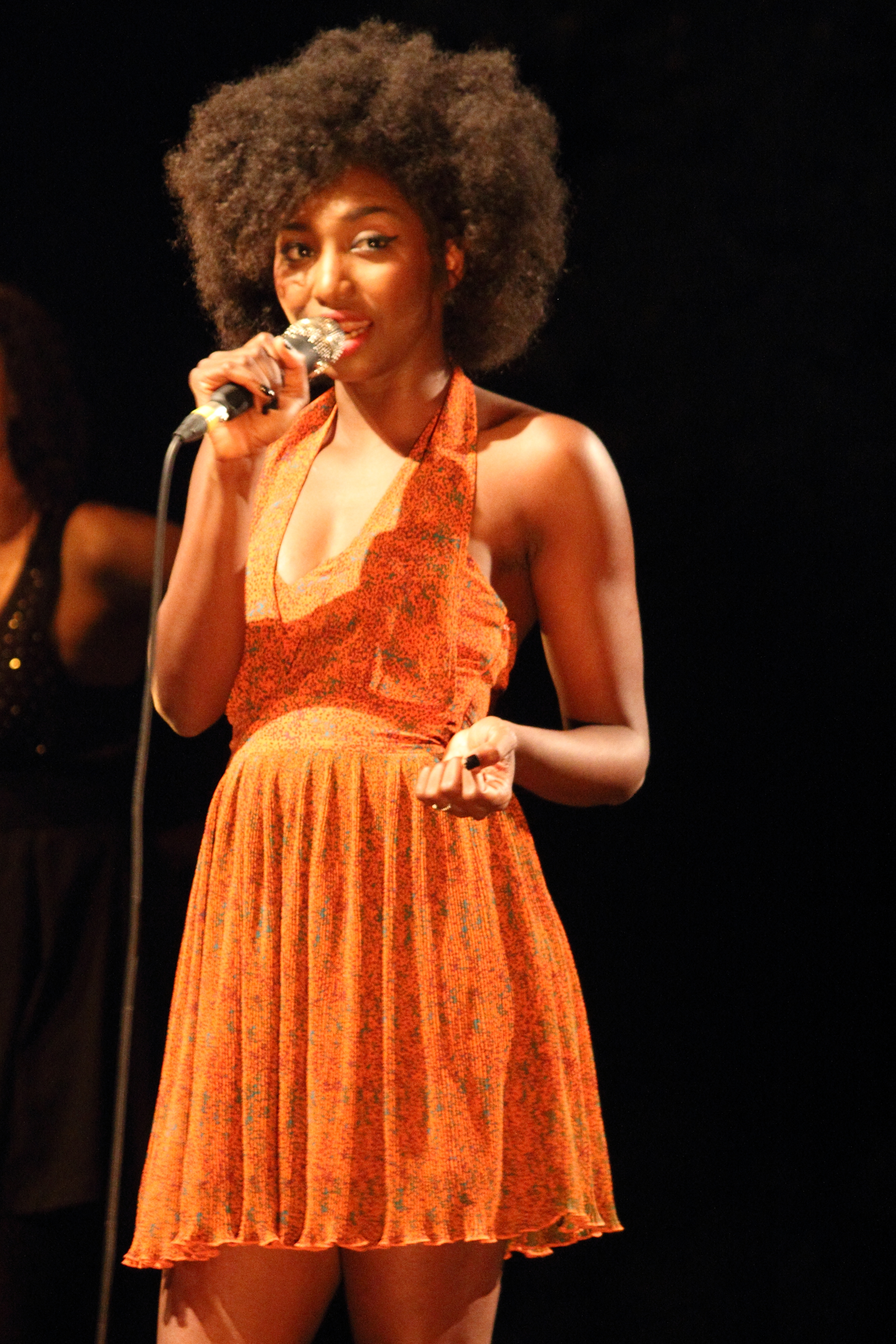 Inna Modja à Festivaux 2012